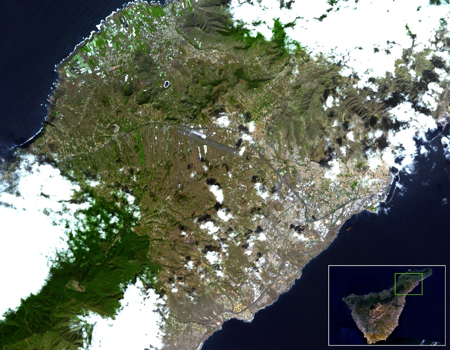 Tenerife lennujaam satelliidipildil.